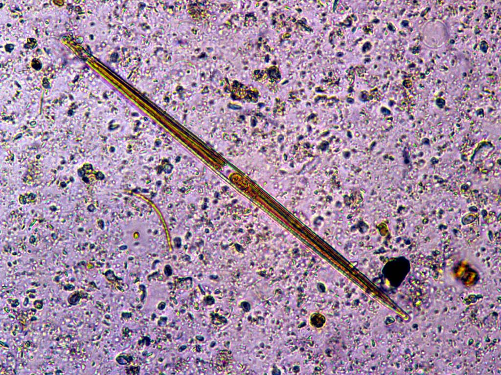 Closterium